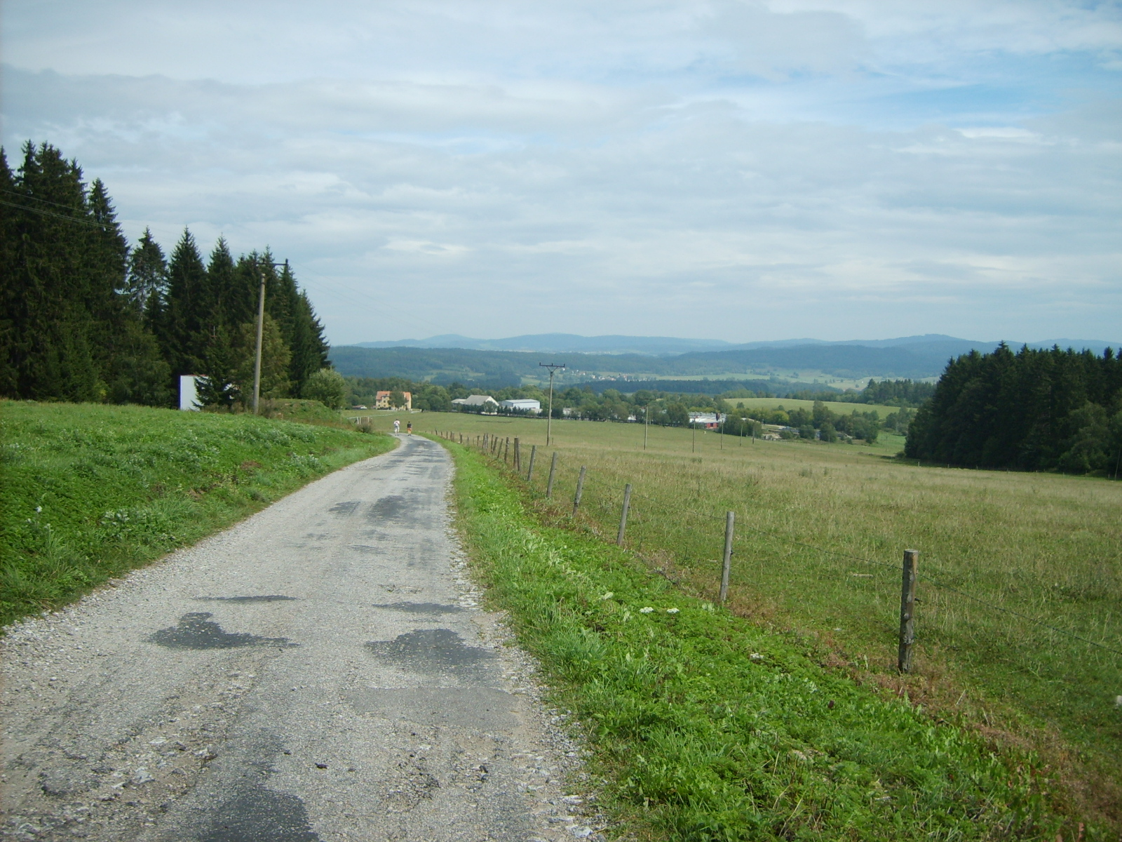 Countryside near Trojany, Dolní Dvořiště municipality.